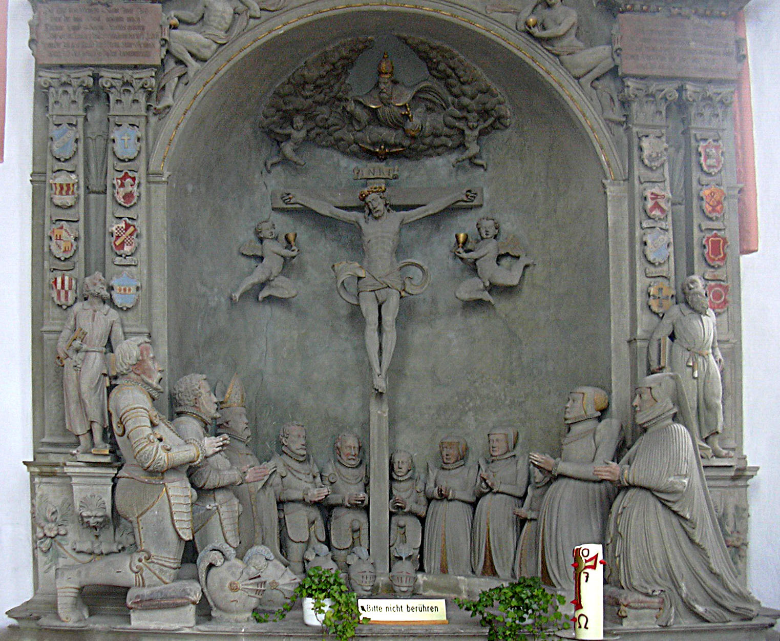 Hessenthal, pilgrims' church, Echter family epitaph, Bavaria/Germany (Epitaph für Peter III. Echter (1520-1576) und Gertraud von Adolzheim (1525–1583))